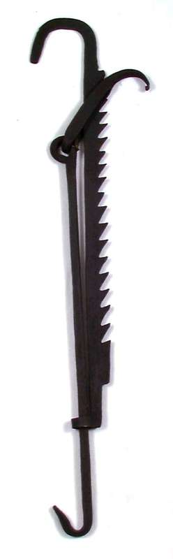 Skjerding i smijern fra Fjaler i Sogn og Fjordane. Foto Norsk Folkemuseum NF.1921-1677.